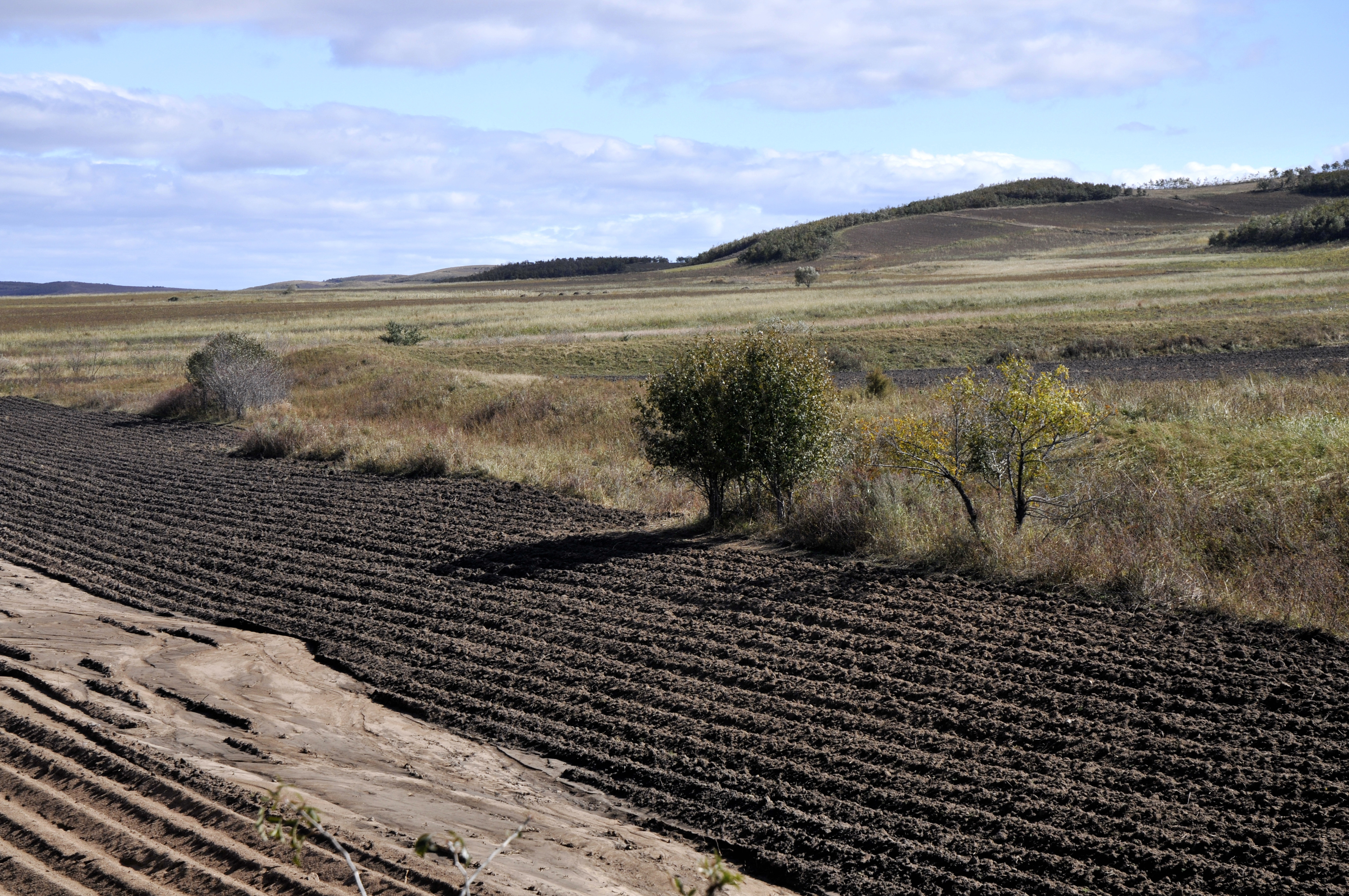 金长城东起第一座边堡